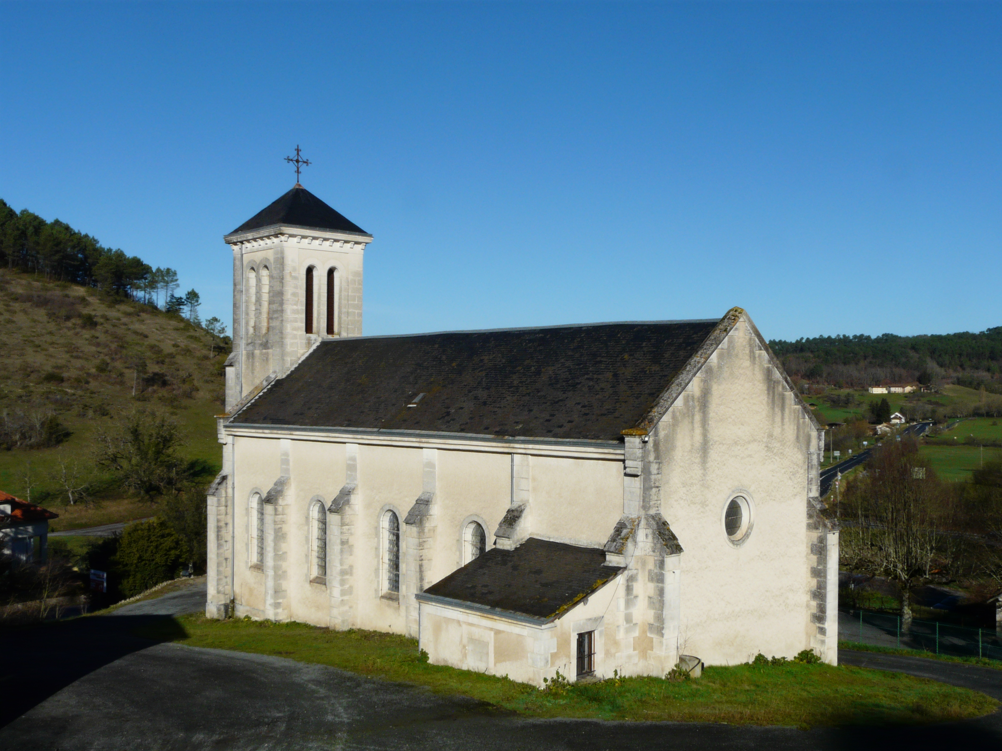 L'église Notre-Dame-de-l'Assomption de Bordas, Grun-Bordas, Dordogne, France.